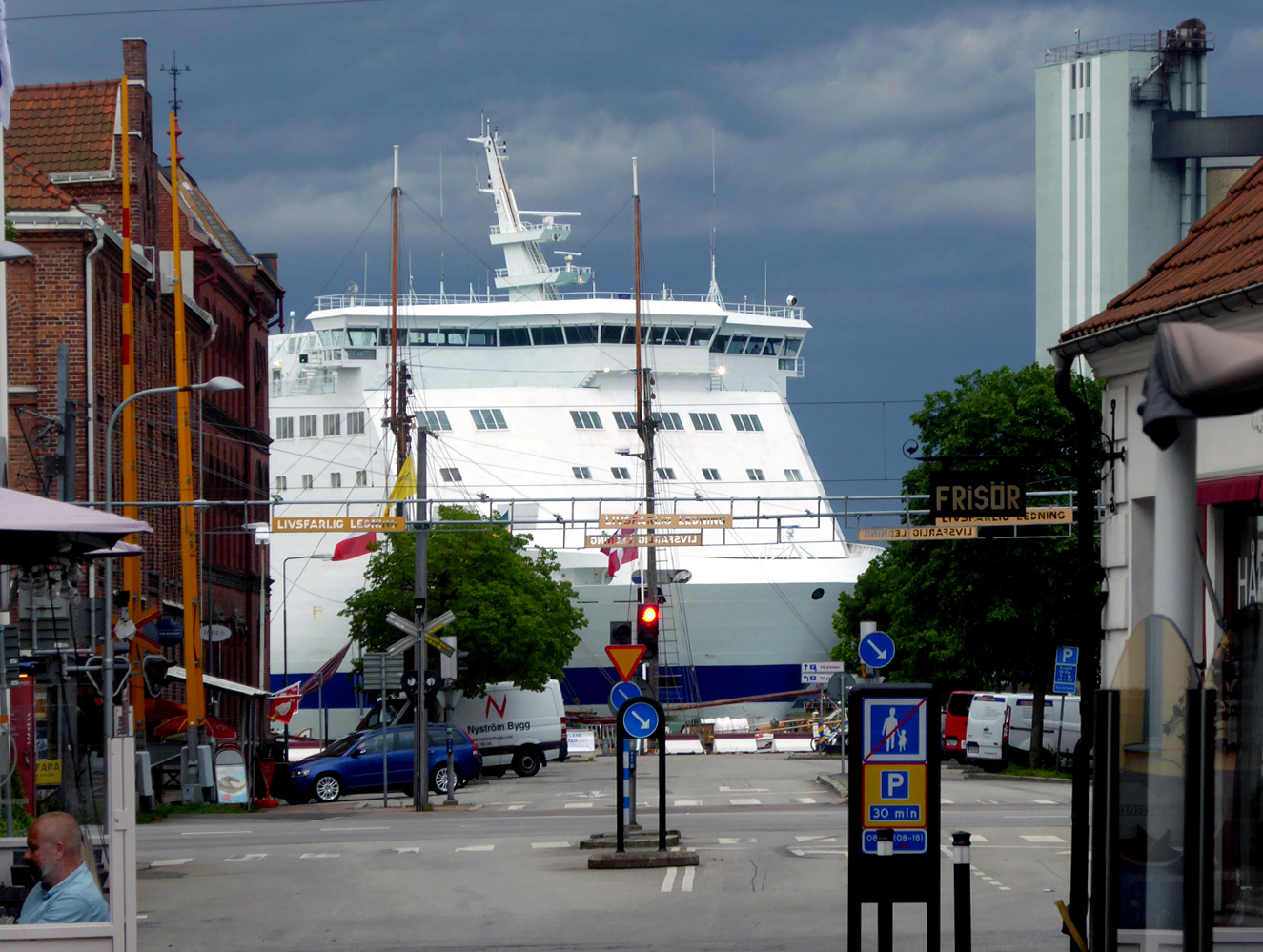 Ett exempel på den komprimerande effekt som teleobjektivet ger. Brännvidden är 200mm, från trafikskylten th är det 320 meter till fartyget.